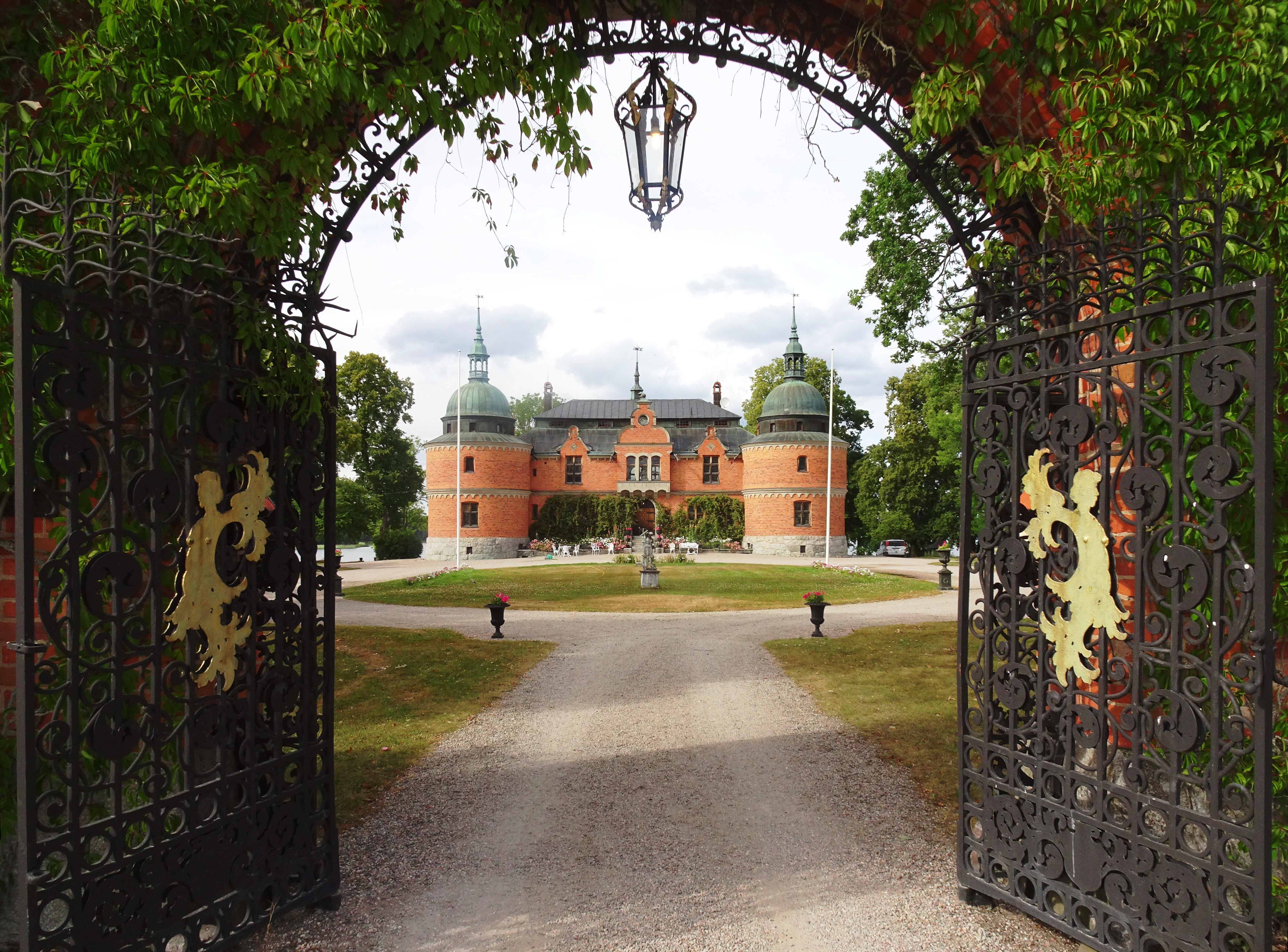 Rockelstads slott grind